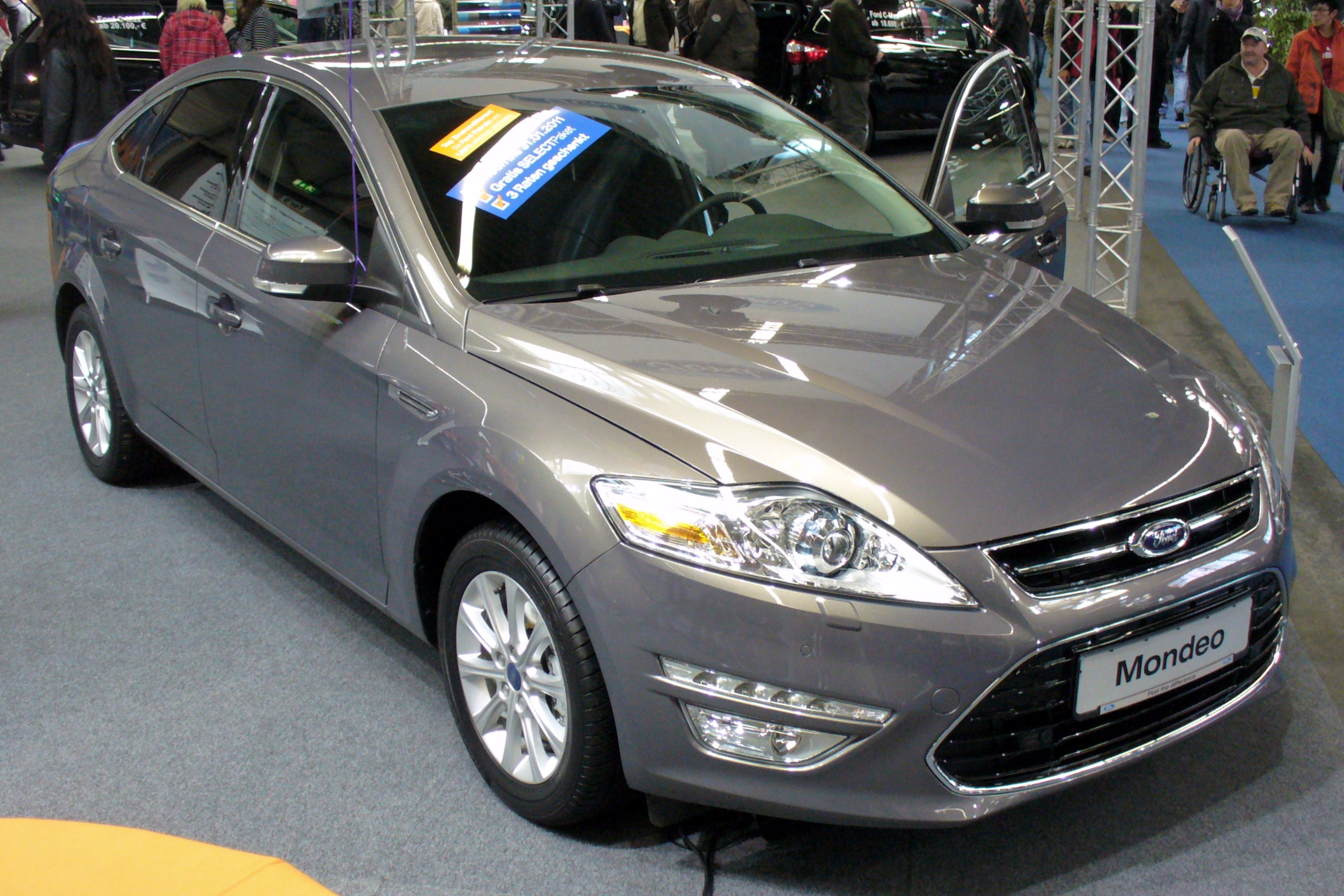 Ford Mondeo